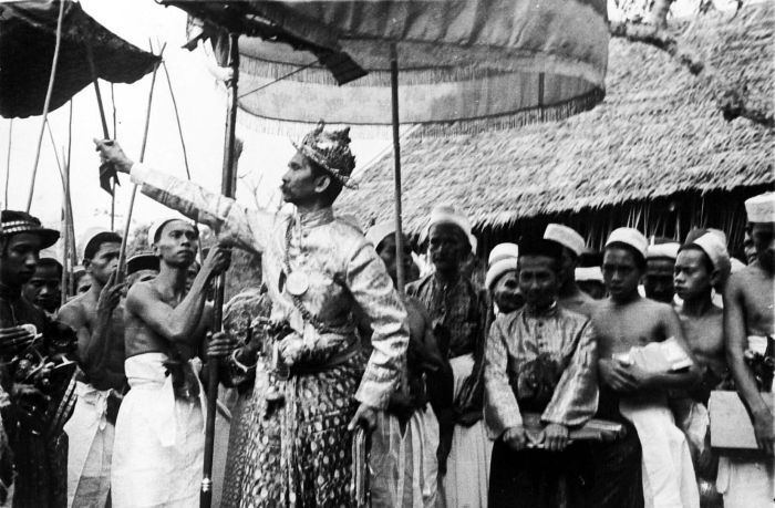 Repronegatief. Mangi Mangi Karaëng Bontonompo, koning van Gowa, betuigt zijn trouw aan het gouvernement van Nederlands-Indië